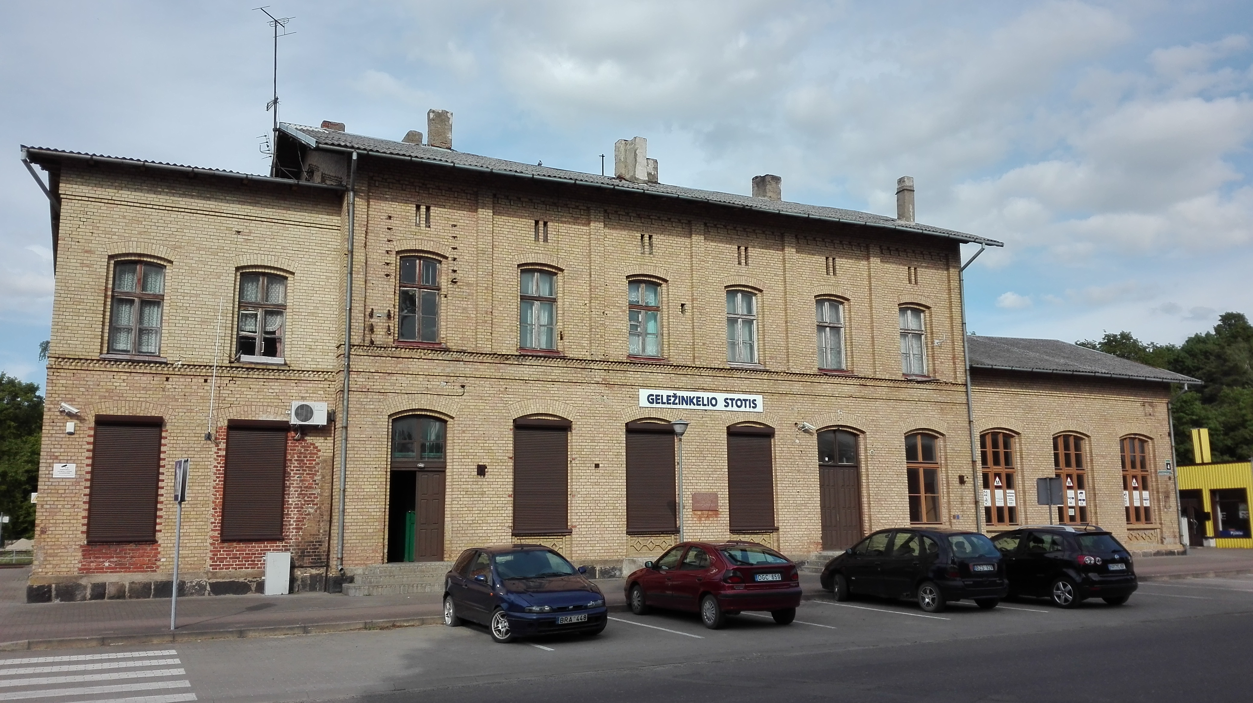 Šilutės geležinkelio stotis